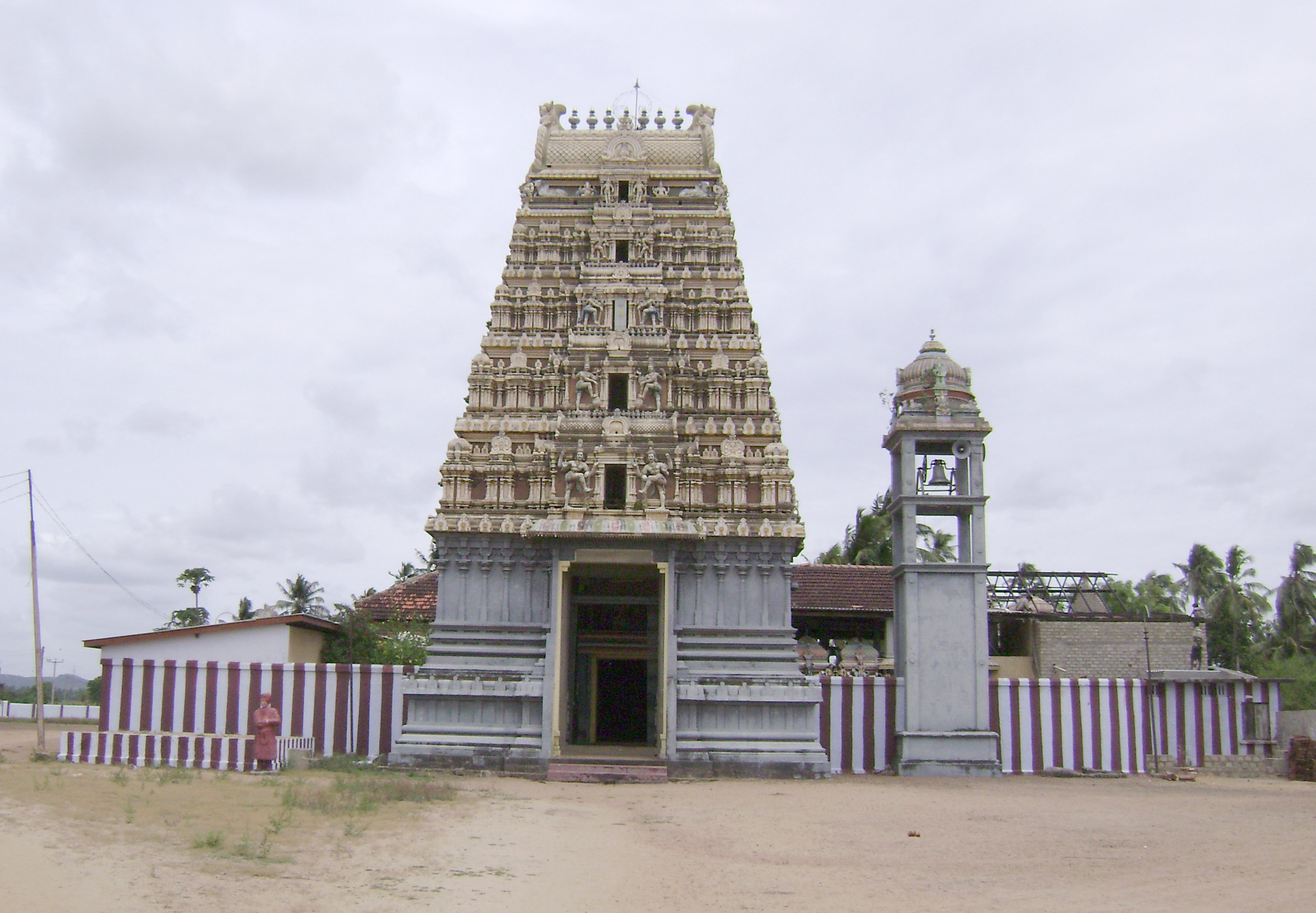 Athi Koneswaram temple, Tampalakamam, Trincomalee, Sri Lanka